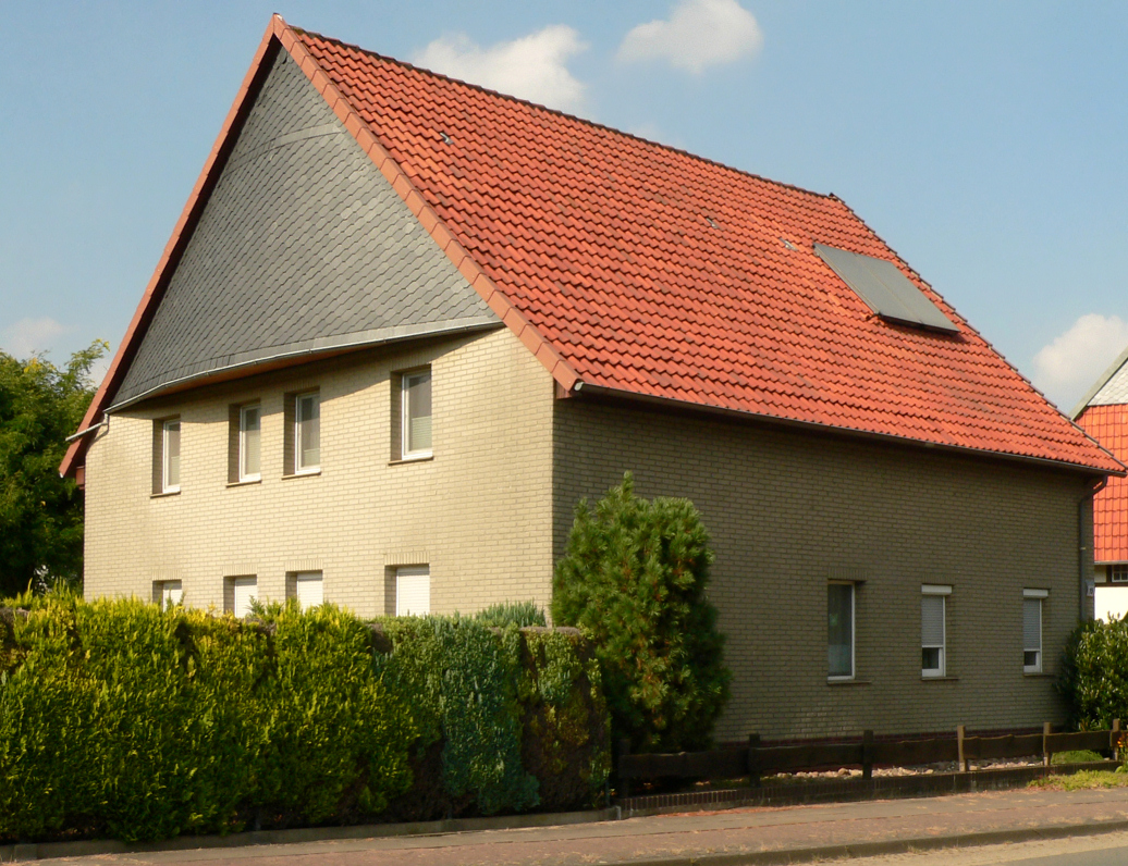 Schaumburger Mütze in Kleinenbremen, modern